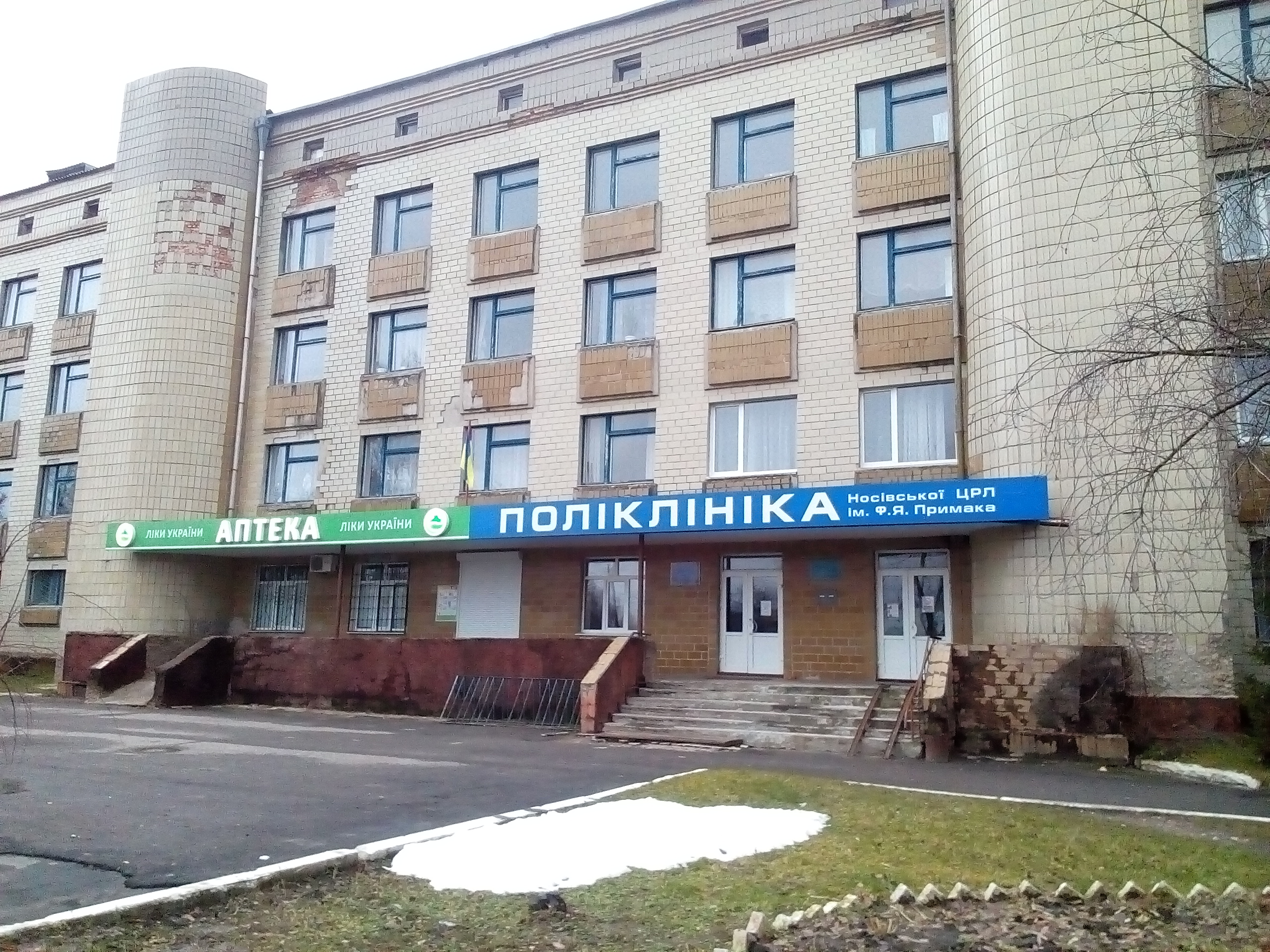 Фото від 17.12.2017 року